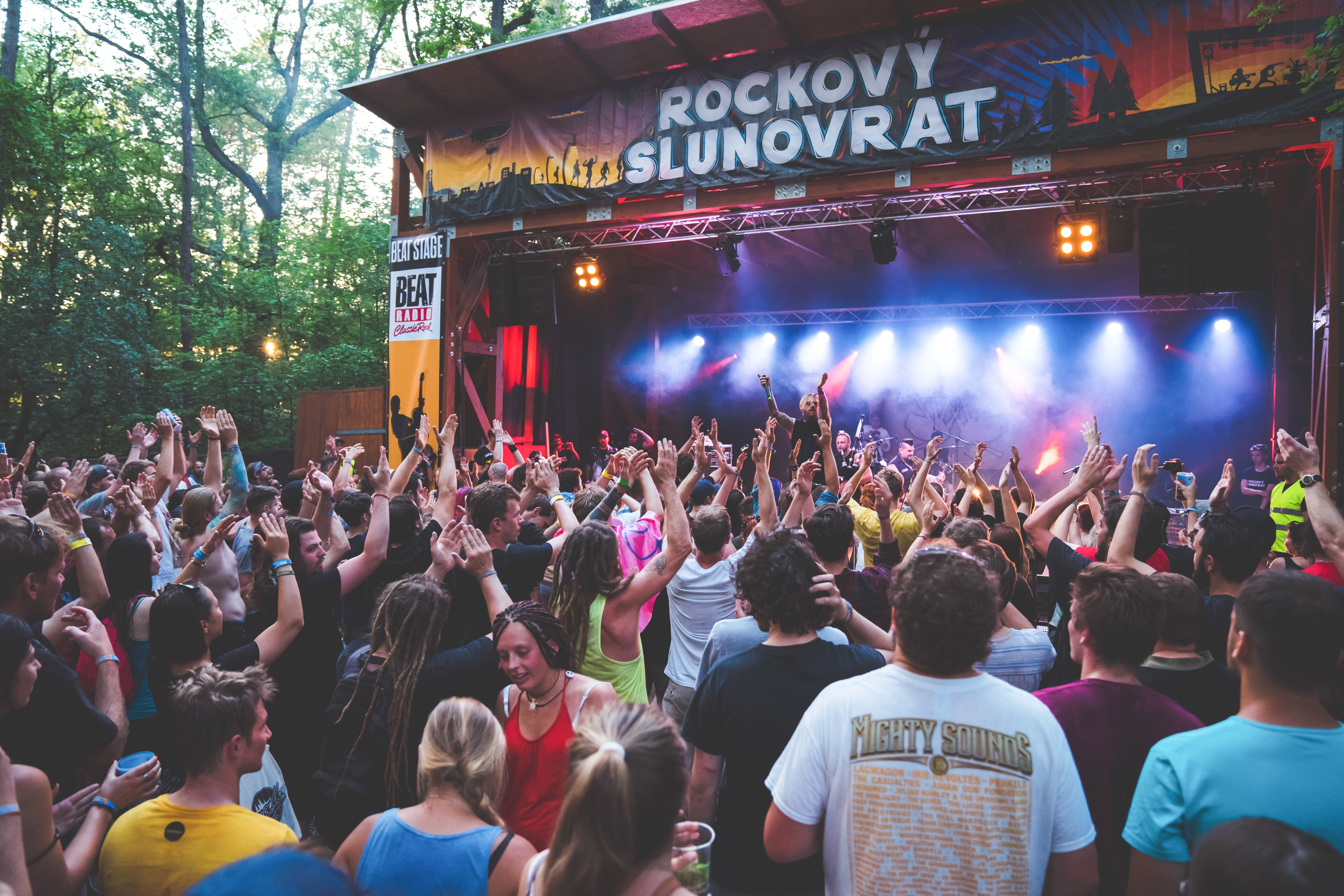 Rockový Slunovrat 2018 - vedlejší pódium